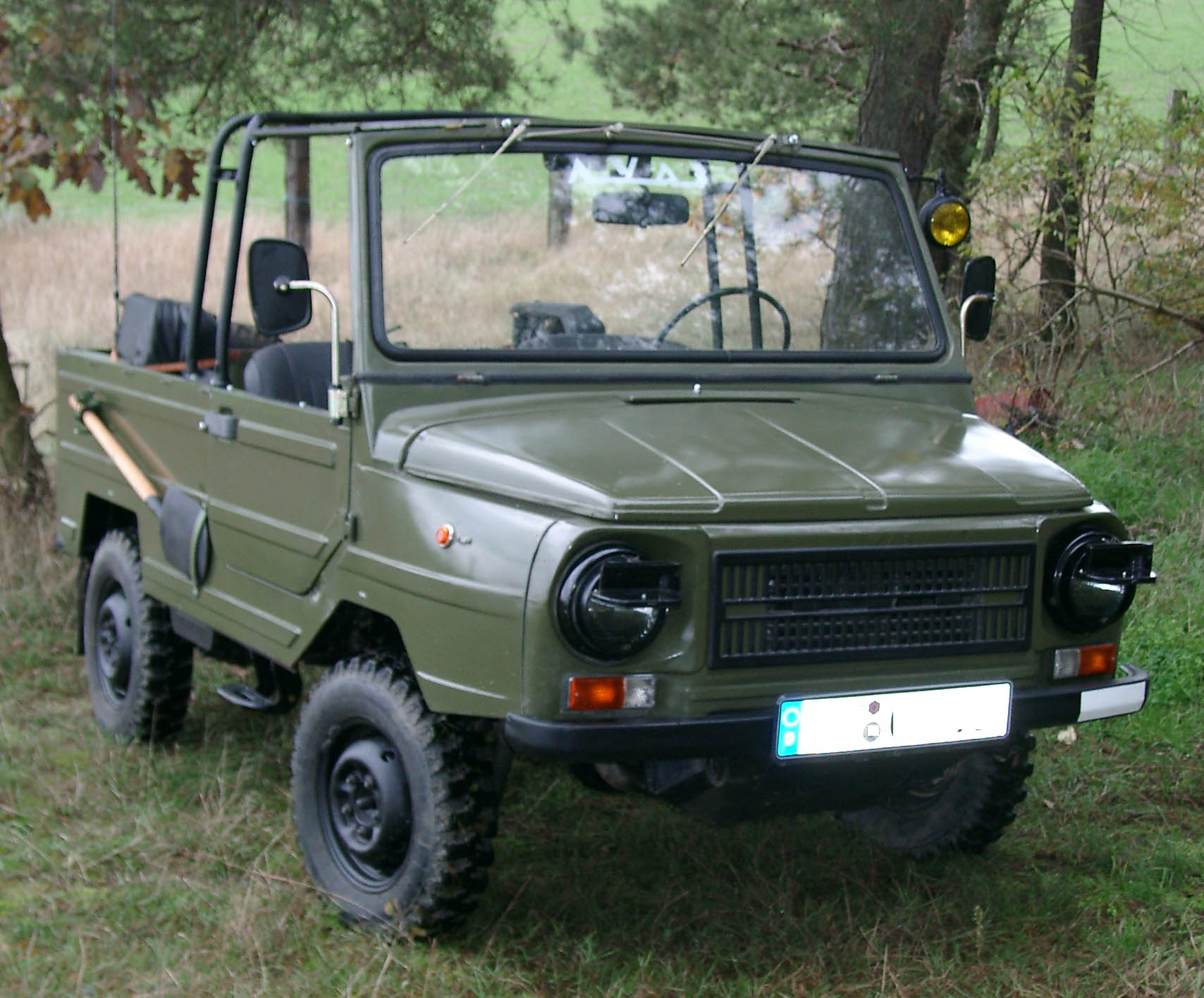 LuAZ 969m Vorderansicht